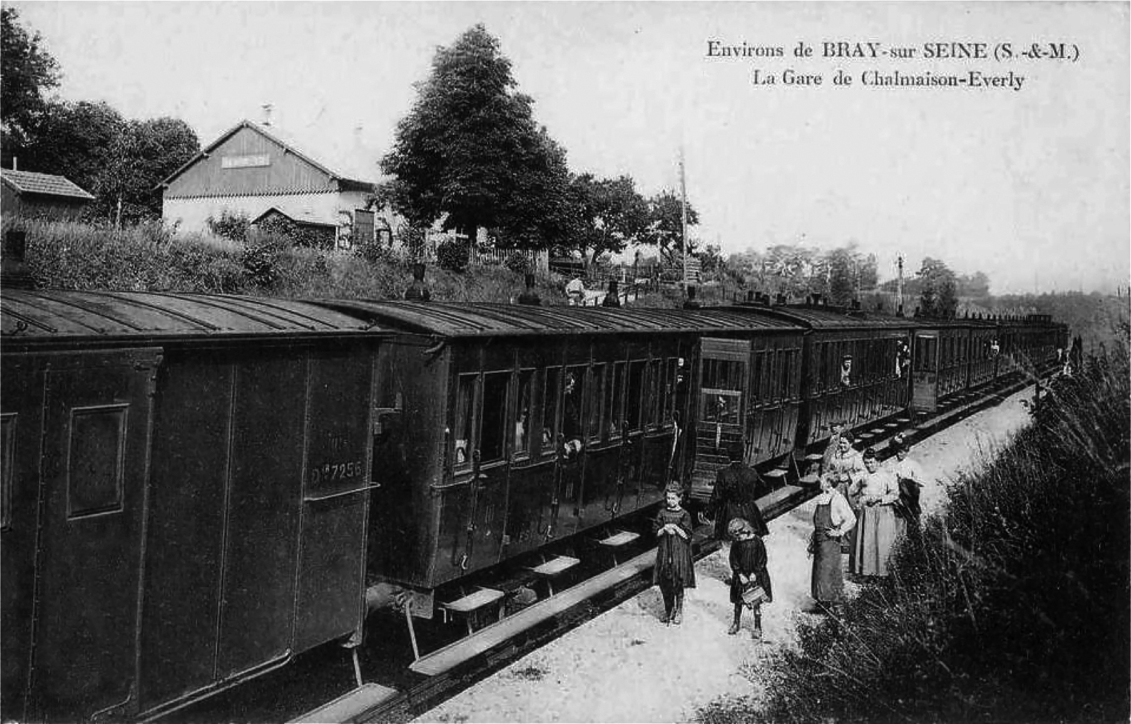 Un train à l'arrêt à la gare de Chalmaison-Everly.